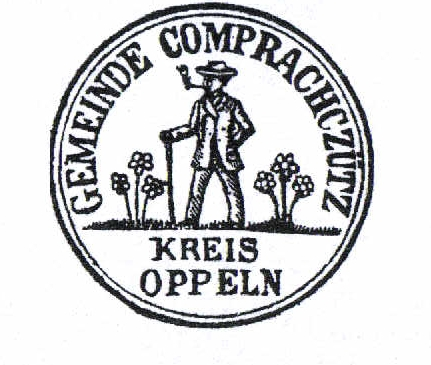 Comprachtschütz - Komprachcice. Pieczęć gminna